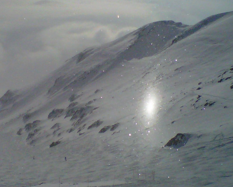 subsun sans obstacle